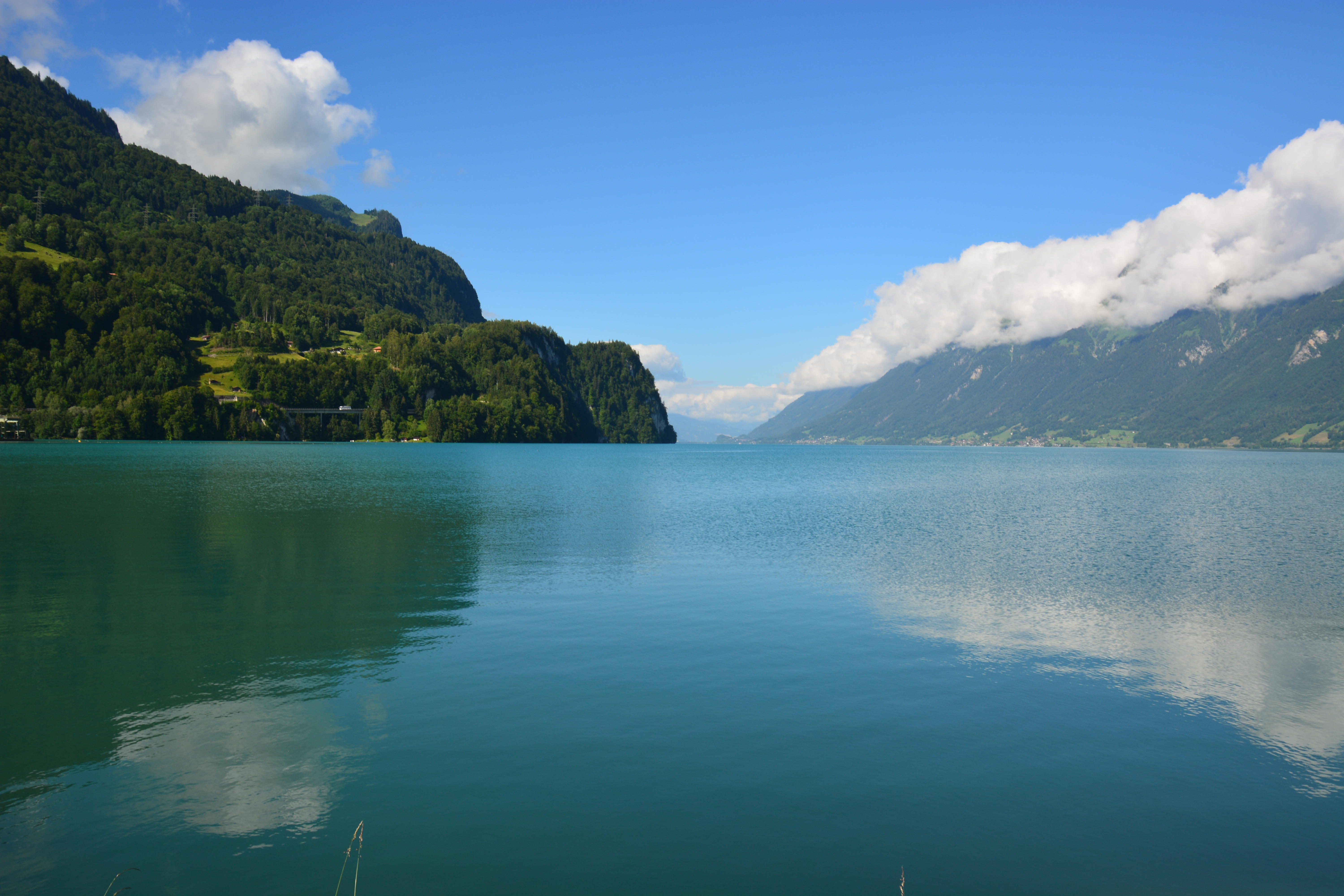 am Brienzersee bei Brienz, Nähe des Campingplatzes